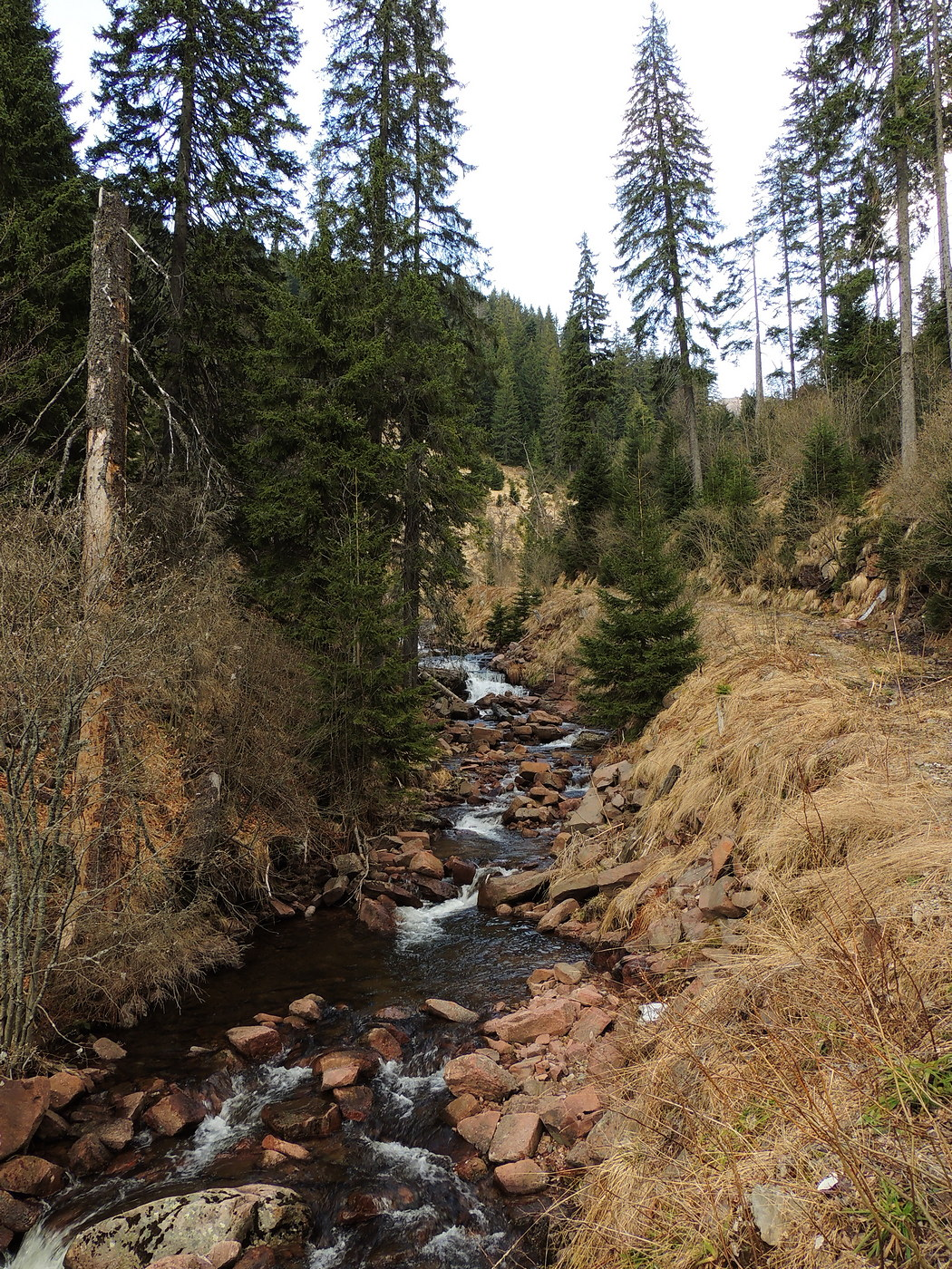 Reka koja nastaje na vrhu Kopren an Staroj planini na mestu poznatom pod nazivom Tri Kladenca. Spuštajući se niz padine Koprena, prolazi kroz četinarsku šumu poznatu kao Arbinje i nastavlja svoj tok do Vrela, gde joj se priključuje Jelovička reka i tada nastaje Visočica, reka koja 15tak kilometara nizvodno prelazi u Zavojsko jezero.